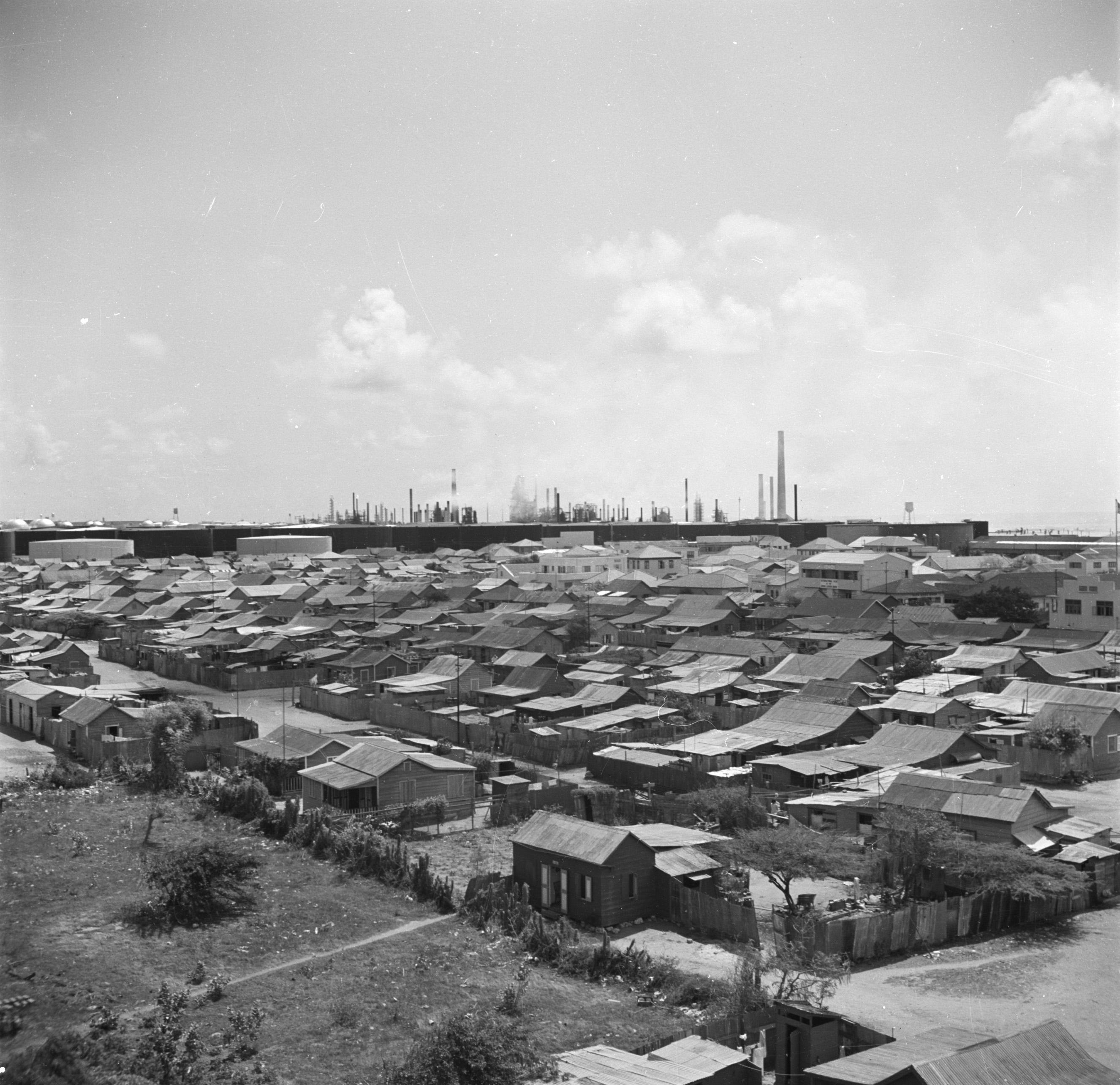 Collectie / Archief : Fotocollectie Van de Poll Reportage / Serie : Reis naar Suriname en de Nederlandse Antillen Beschrijving : Arme woonwijk in San Nicolas op Aruba met op de achtergrond de Lago-olieraffinaderij Datum : 1947 Locatie : Aruba, San Nicolas Trefwoorden : panorama's, raffinaderijen, woningen Fotograaf : Poll, Willem van de, [onbekend] Auteursrechthebbende : Nationaal Archief Materiaalsoort : Negatief (zwart/wit) Nummer archiefinventaris : bekijk toegang 2.24.14.02 Bestanddeelnummer : 252-8017